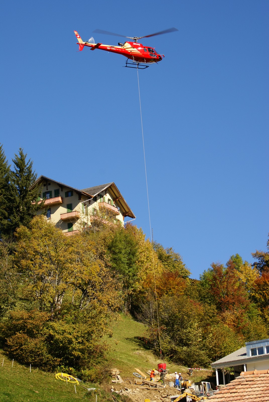 Eurocopter AS 350 mit Last